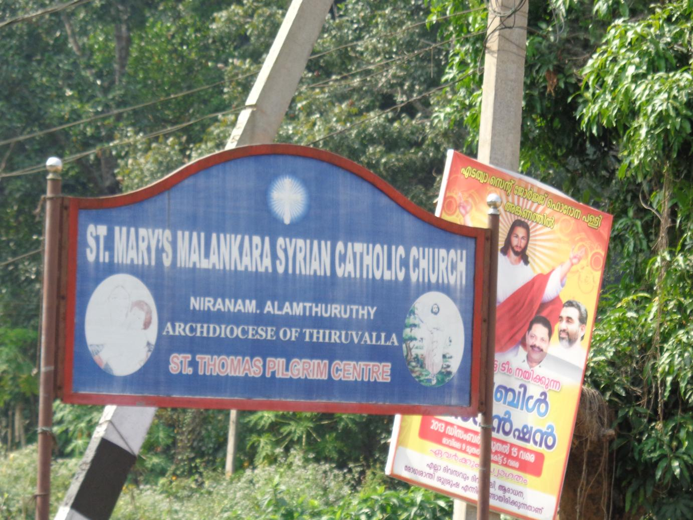 നിരണം കത്തോലിക്കാപള്ളിയുടെ ഫലകം